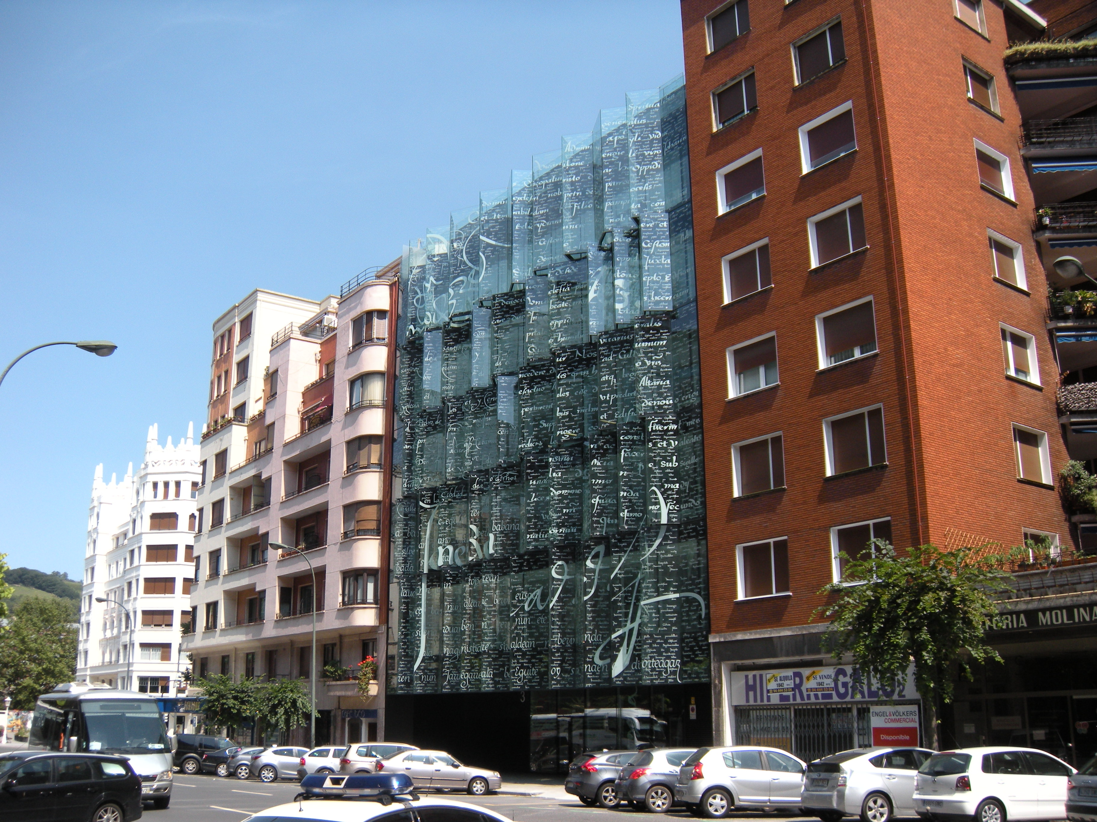 Bilbao